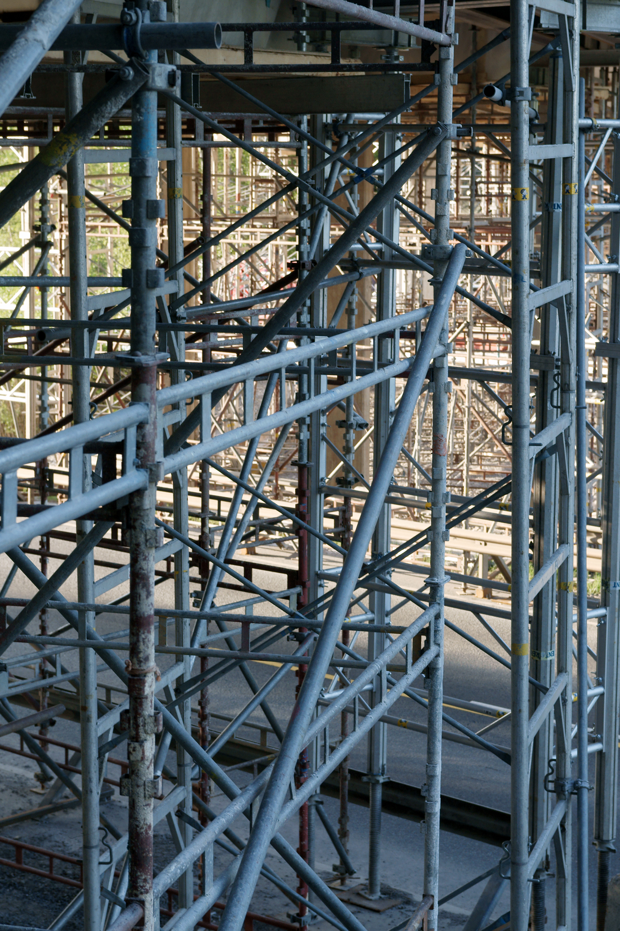 Mäntyluodontien ylittävä silta, Reposaaren maantien alku, peruskorjauksessa.